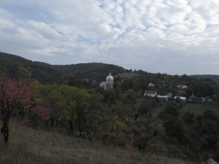 Вид на село Словіта з гори Холявної (Святої) Автор Назар Демський